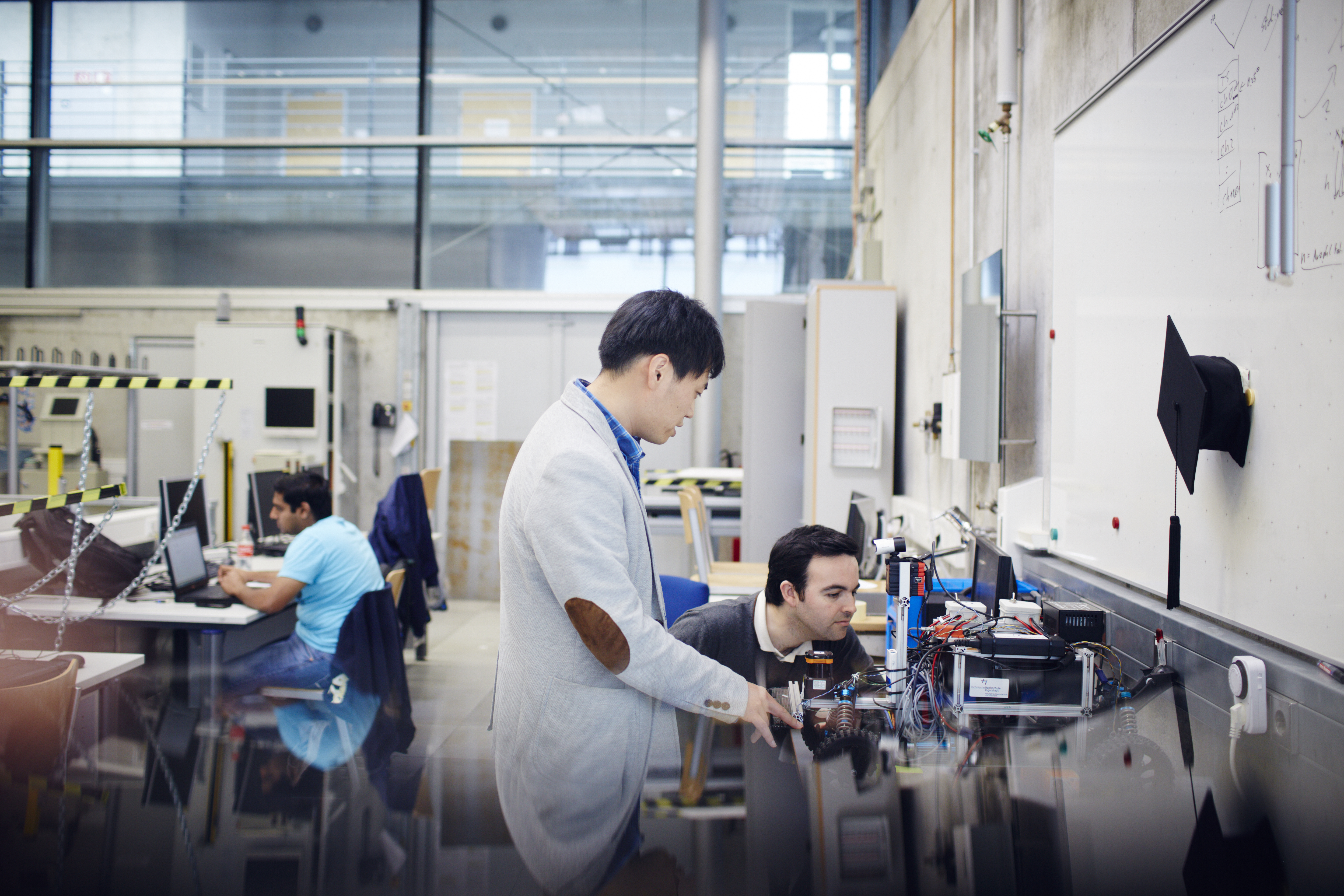 Forschung an der Technischen Hoschule Ingolstadt